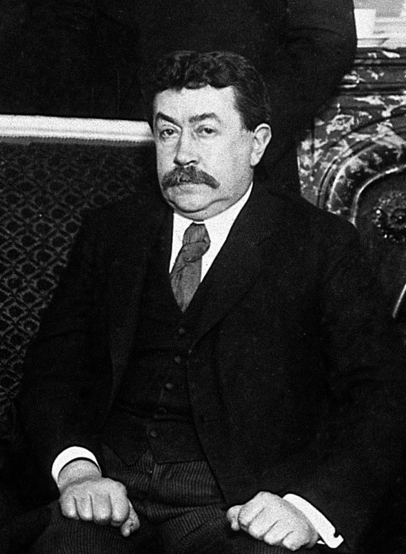 Lunch in honour of Albert Einstein, Paul Painlevé